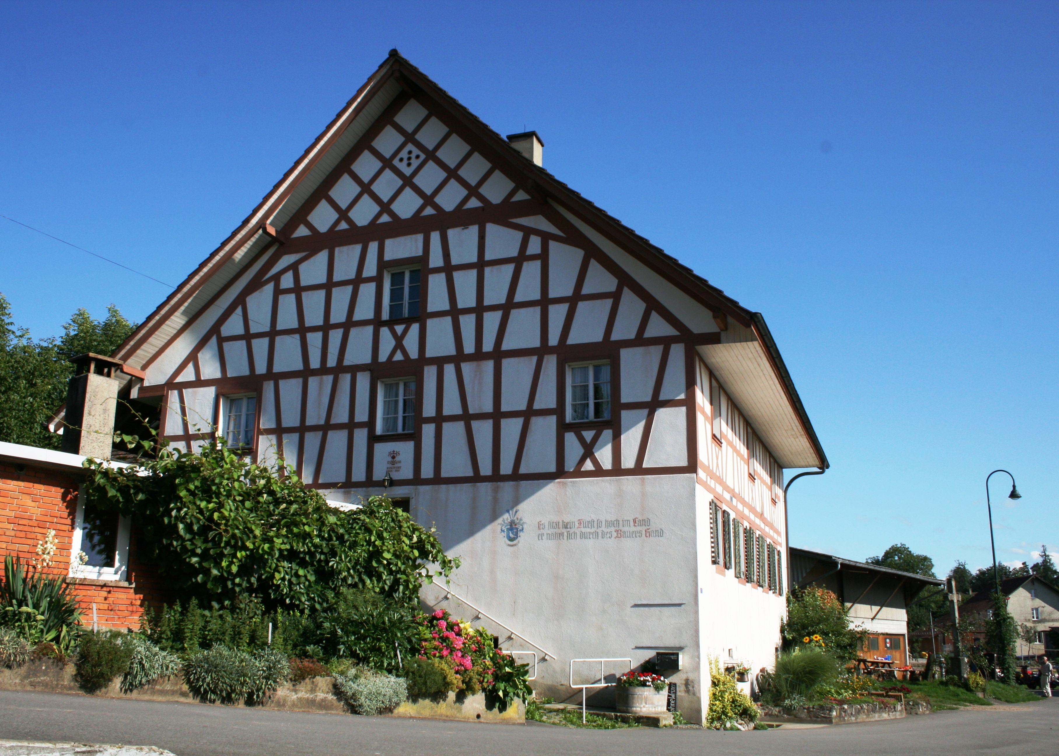 Bauernhaus im Birmenstorfer Ortsteil Müslen, Schweiz